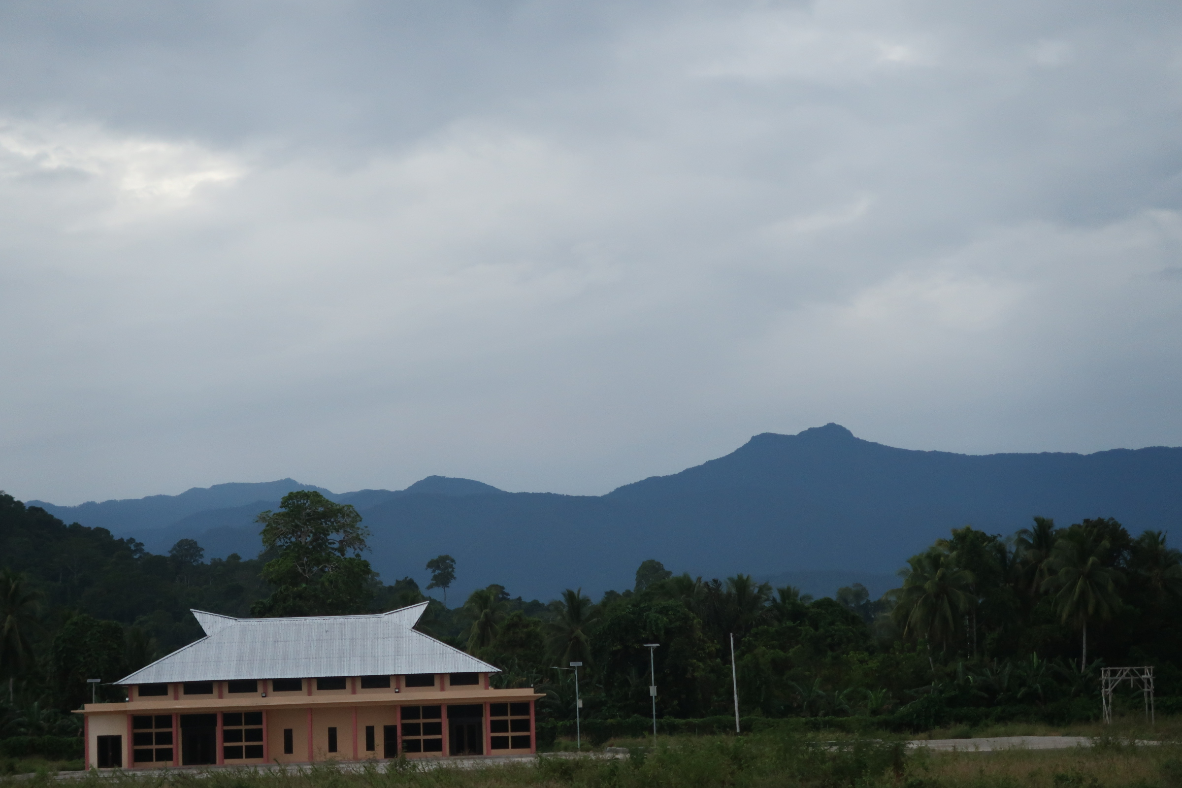 Terminal bandara werur, Tambrauw Indonesia